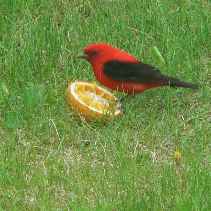 Scarlet Tanager Piranga olivacea, Minnesota